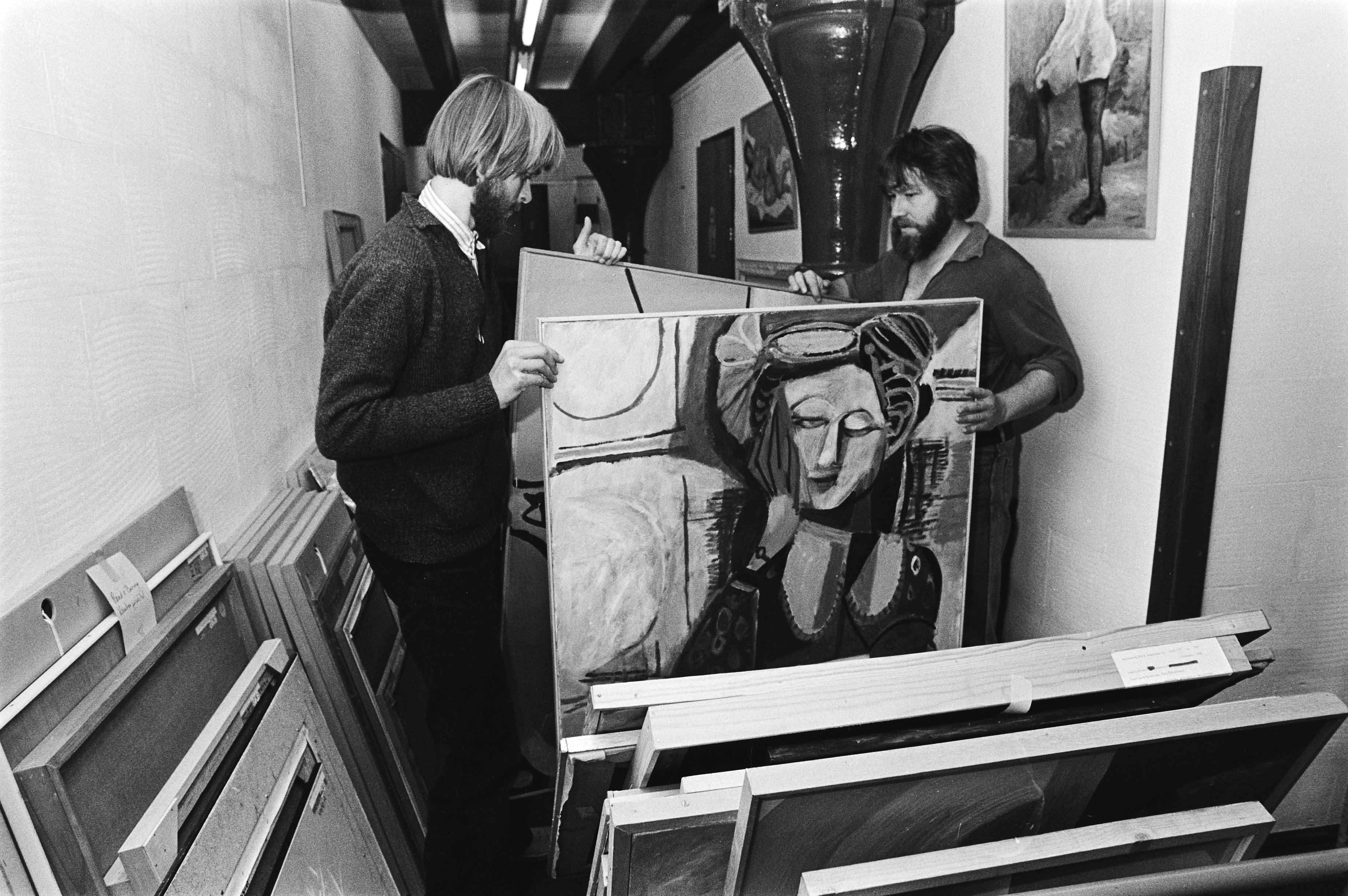 Collectie / Archief : Fotocollectie Anefo Reportage / Serie : [ onbekend ] Beschrijving : Bezetting van het kantoor BKB (Beheer Kunstwerken BKR; Beeldende Kunst Regeling) aan de Oostelijke Handelskade in Amsterdam door beeldende kunstenaars Datum : 29 oktober 1979 Locatie : Amsterdam, Noord-Holland Trefwoorden : artiesten, bezettingen, schilderijen Fotograaf : Dijk, Hans van / Anefo Auteursrechthebbende : Nationaal Archief Materiaalsoort : Negatief (zwart/wit) Nummer archiefinventaris : bekijk toegang 2.24.01.05 Bestanddeelnummer : 930-5154